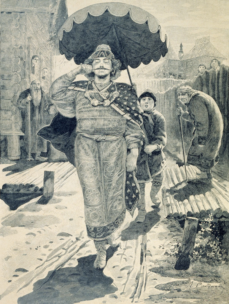 Чурило Пленкович. 1895. Иллюстрация к книге "Русские былинные богатыри"